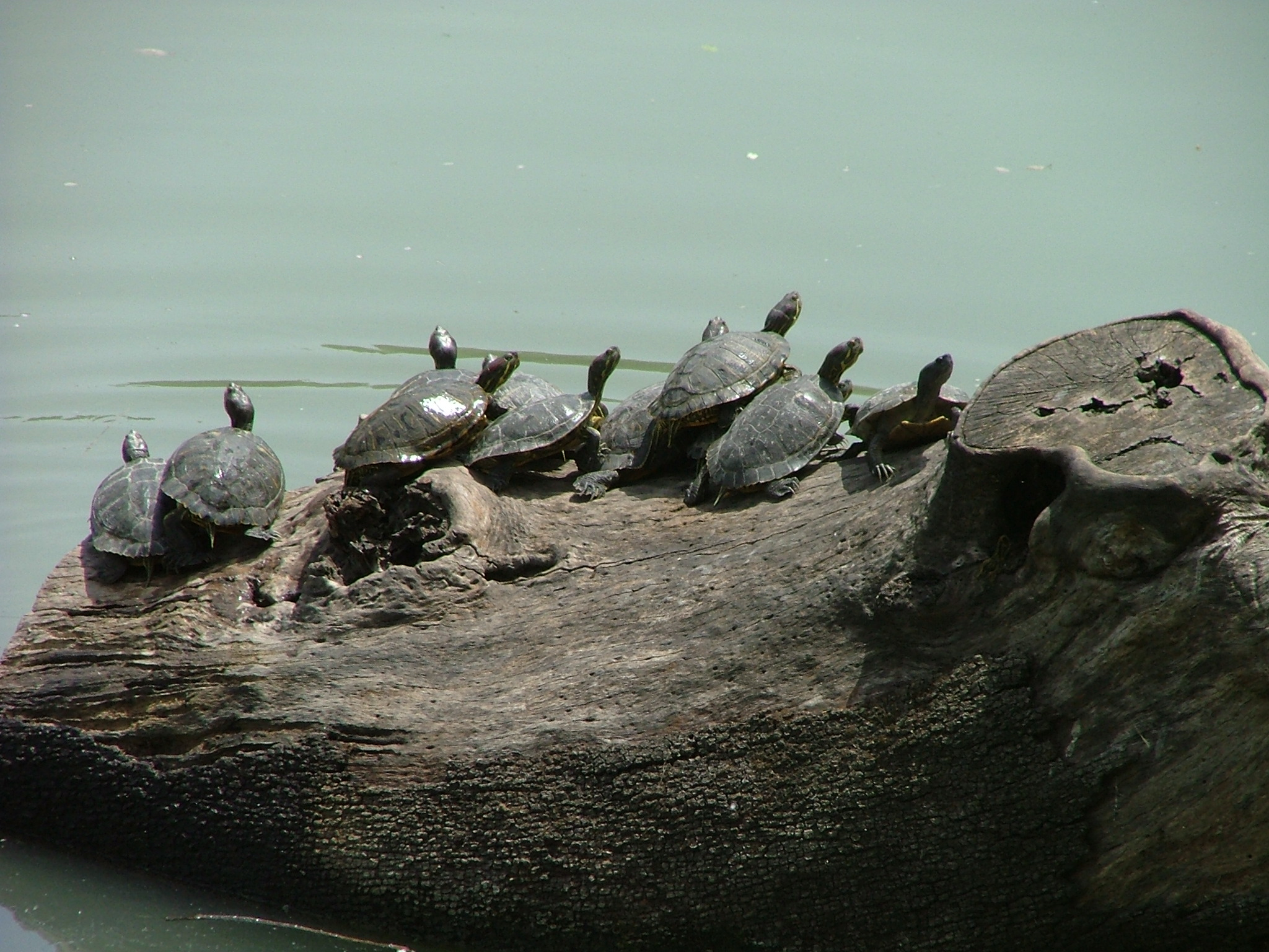 Trachemys scripta, lago di villa Pamphilj, Roma, Italy